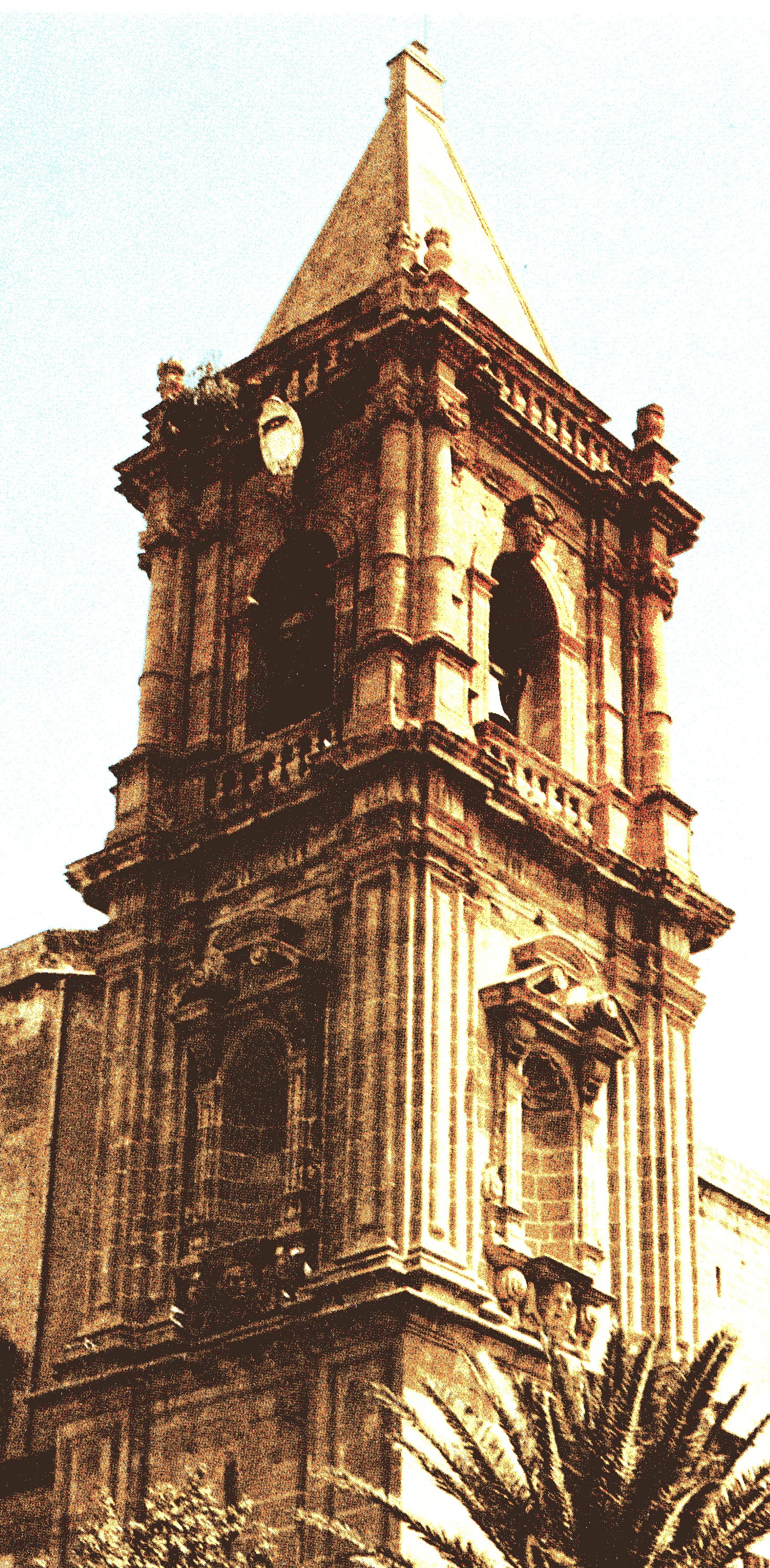 Campanile della Basilica dell'Annunziata, Trapani